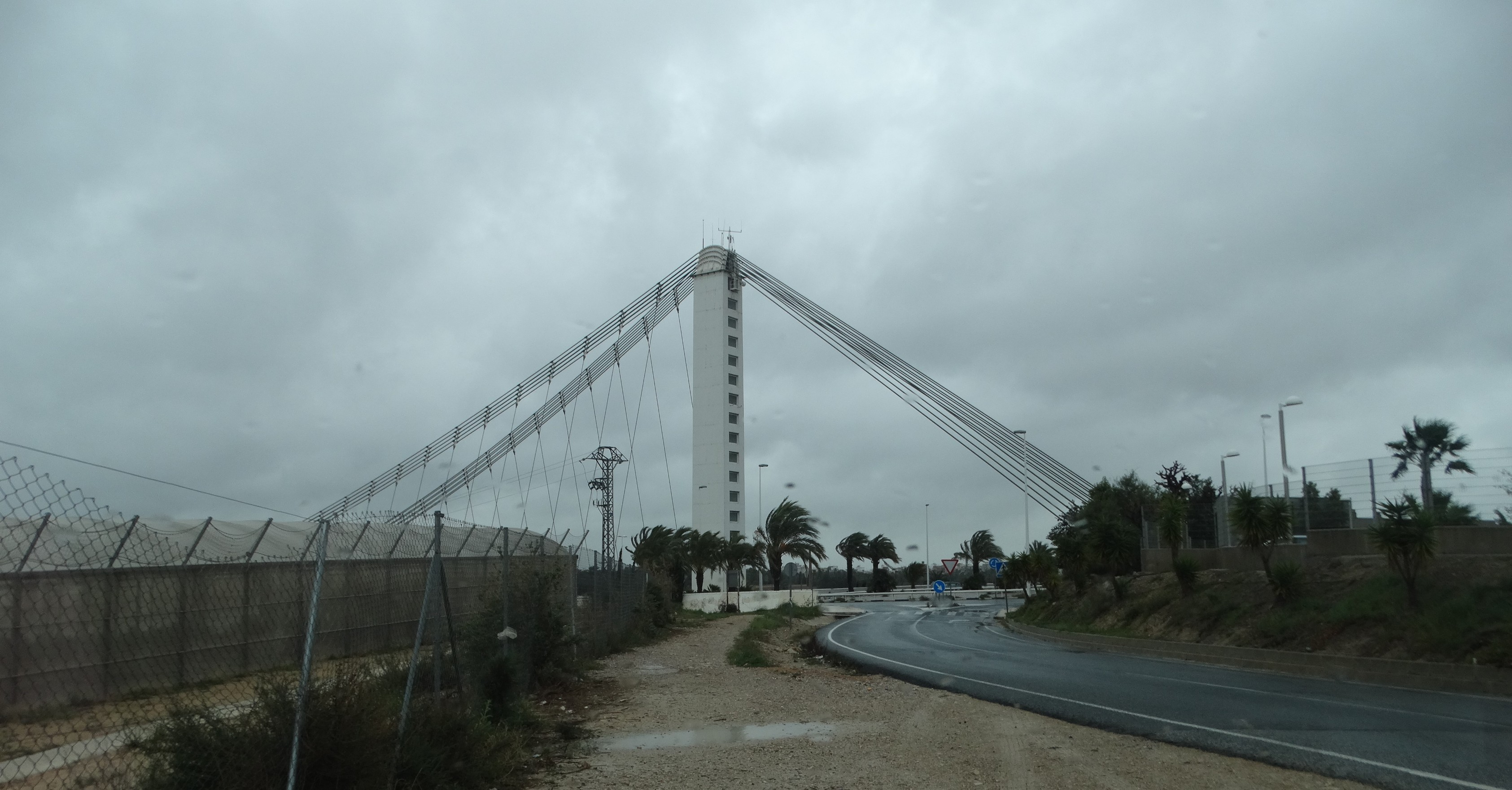 Pont del Bimil.lenari sobre río Vinalopó